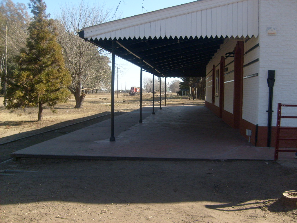 Estacion de ferrocarril de Intendente Alvear.